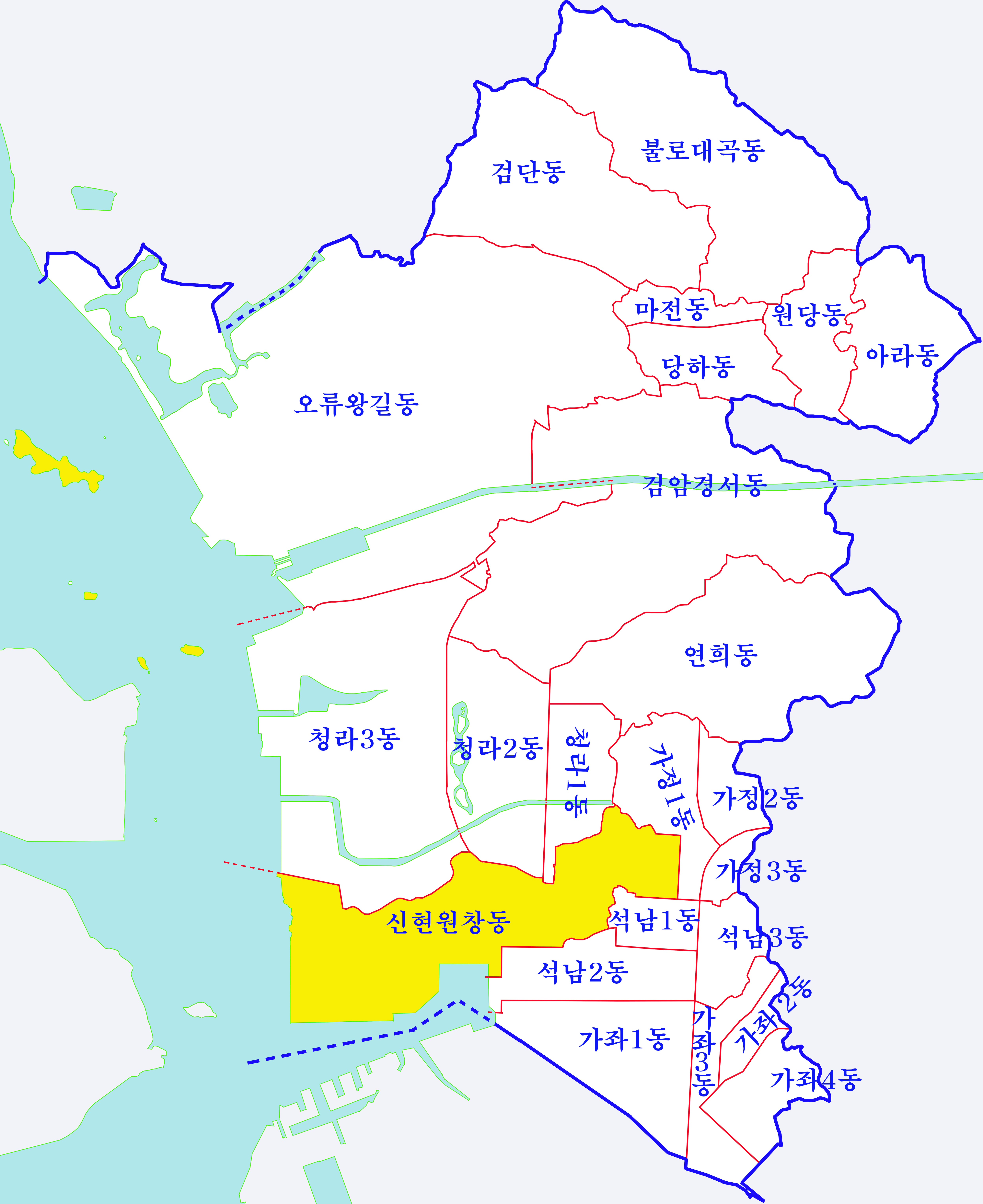 인천광역시 서구 행정구역도